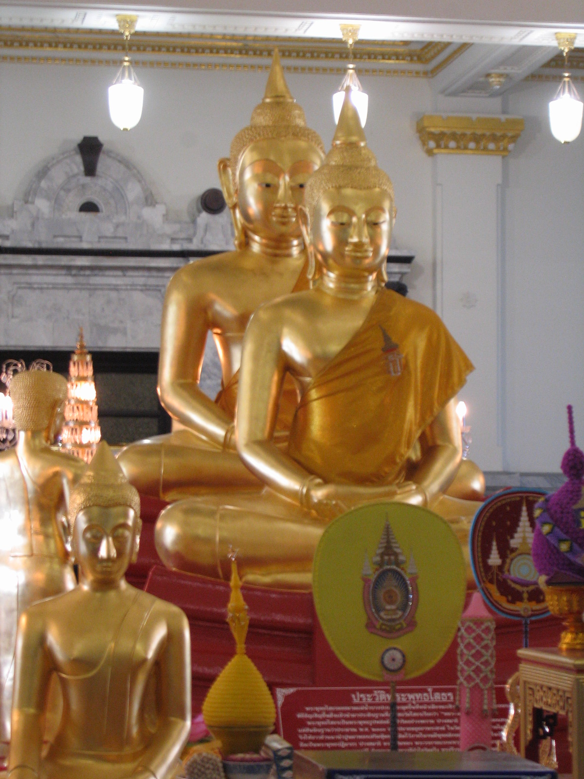 พระพุทธโสธร ในพระอุโบสถหลังใหม่ วัดโสธรวรารามวรวิหาร ฉะเชิงเทรา